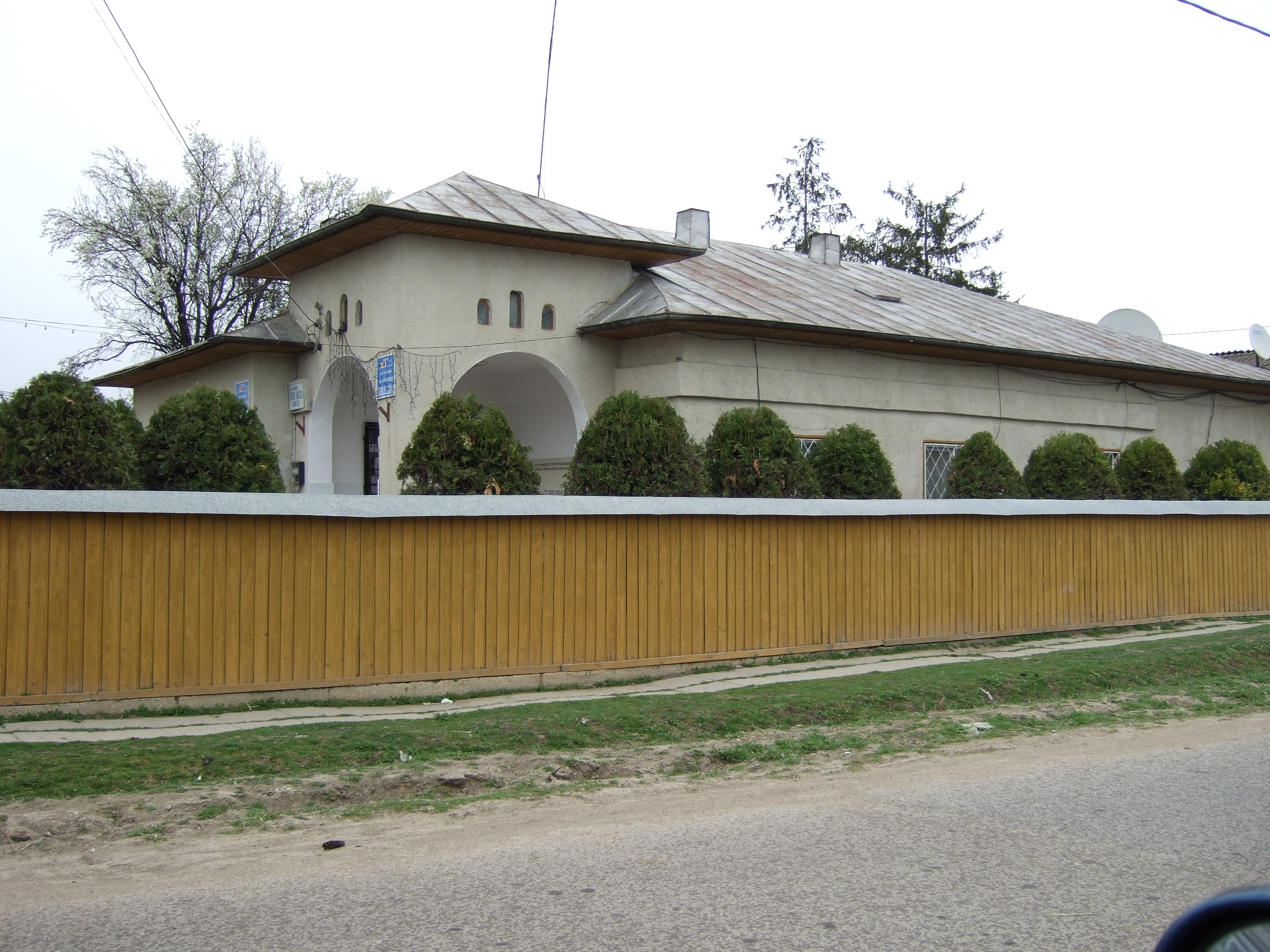 Primaria com.Axintele